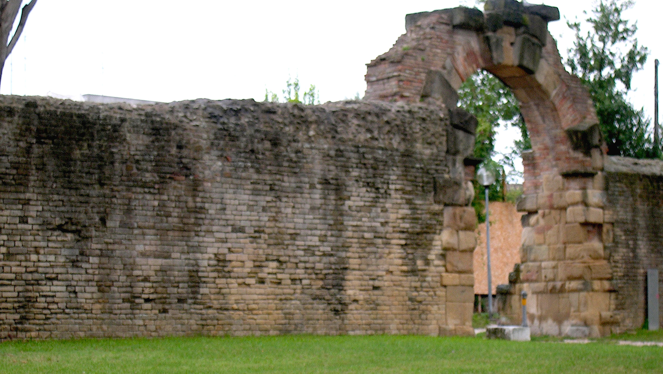 Mura romane di Fano nei pressi della Porta della Mandria